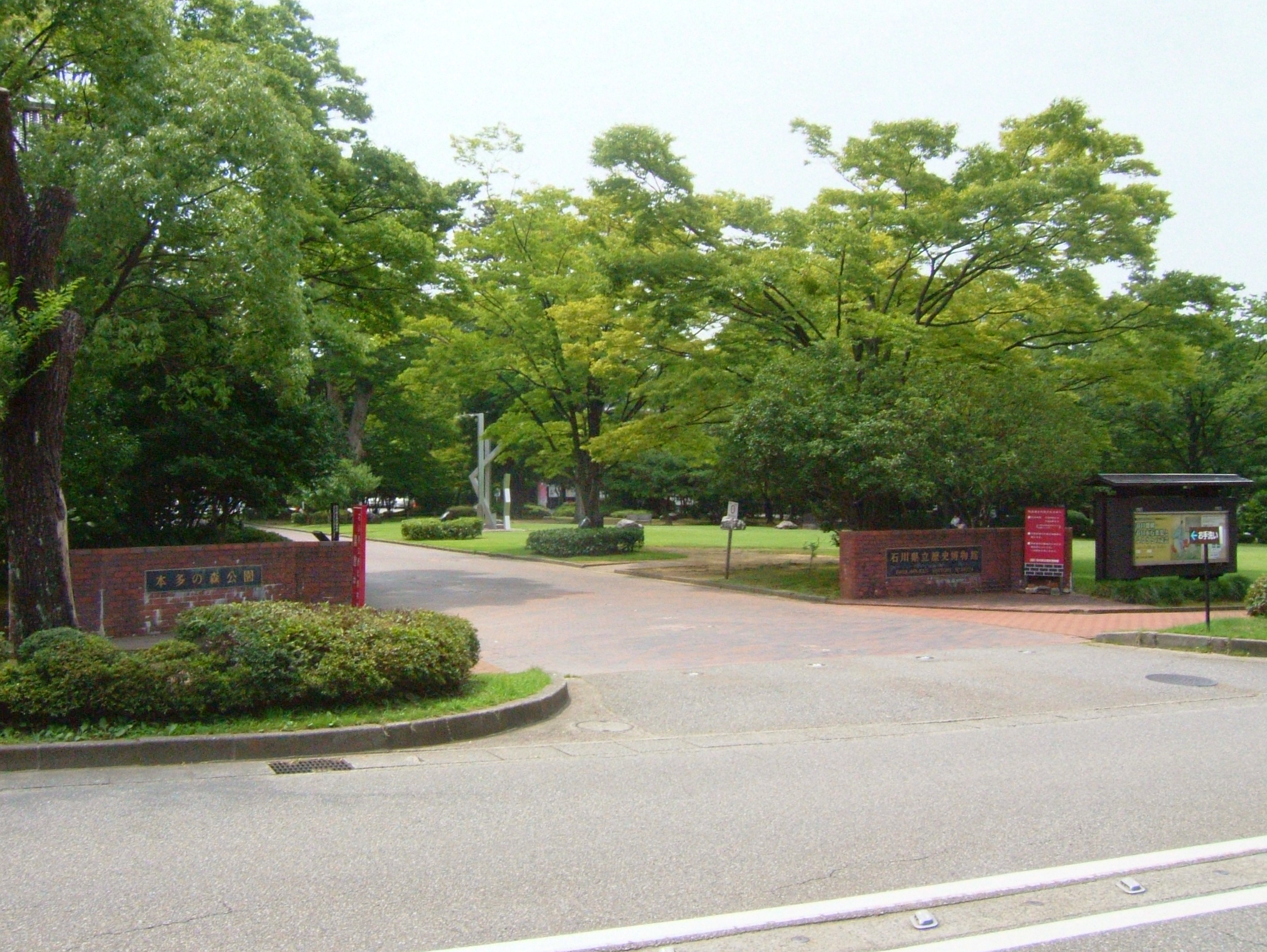 本多の森公園（石川県金沢市）